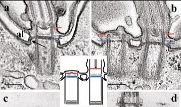 Fig. 3. Secciones longitudinales a través de los cuerpos basales de Paramecium. a) conexión entre el Tz y la superficie celular. Dentro del cuerpo basal, el Tz está organizado en tres placas: la placa terminal (línea azul), la placa intermedia (blanca) y la placa axosómica (línea roja). Fuera del cuerpo basal, la placa terminal se extiende para unir el epiplasma (flecha). Dentro del cuerpo basal, se observan gránulos densos. (Al) saco alveolar, un sistema vacuolar ubicado debajo de la membrana celular externa que se encuentra en todos los representantes de Chromalveolata. b) Comparación de Tz de cuerpos basales no ciliados y ciliados: la Tz de los cuerpos basales ciliados está más extendida que la de los cuerpos basales no ciliados, pero las tres placas y la conexión con el epiplasma se detectan en ambos. Dibujo: representación esquemática de cuerpos basales anclados ciliados y no ciliados en esta figura que muestra la zona de transición con sus tres placas: la placa terminal (azul), la placa intermedia (línea discontinua) y la placa axosómica (rojo). Fijación clásica de glutaraldehído /osmio. Barras de escala = 200 nm.